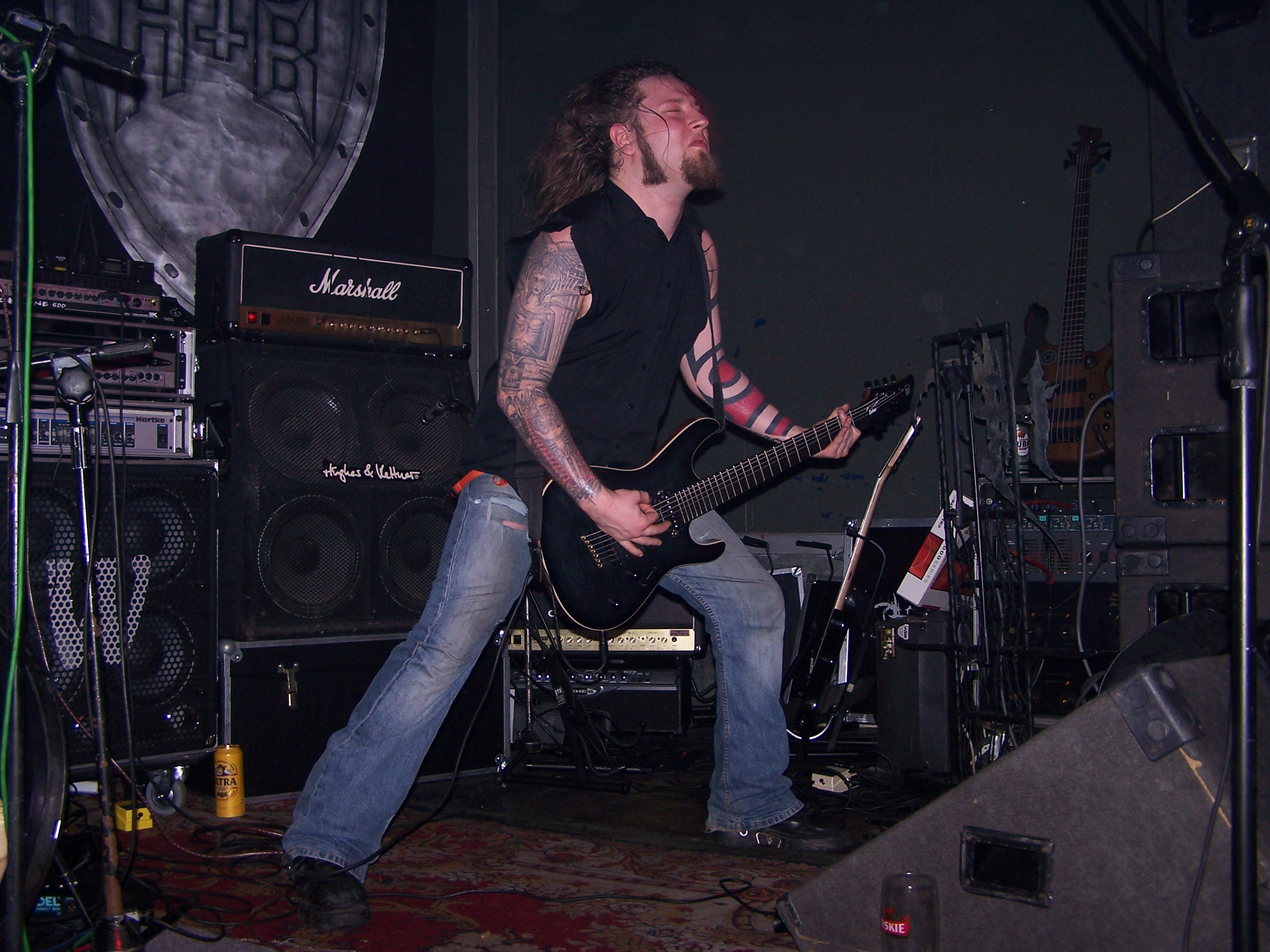 Mateusz 'Havoc' Śmierzchalski - gitarzysta zespołu Blindead podczas koncertu w katowickim Mega Clubie.